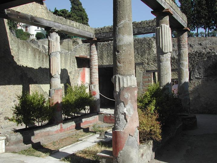 Casa dell'atrio Corinzio foto di Aldo Ardetti (14 agosto 2007)